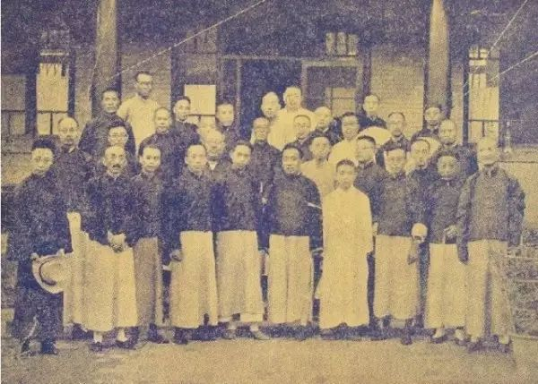 中文（中国大陆）: 1928年湖社会员留影